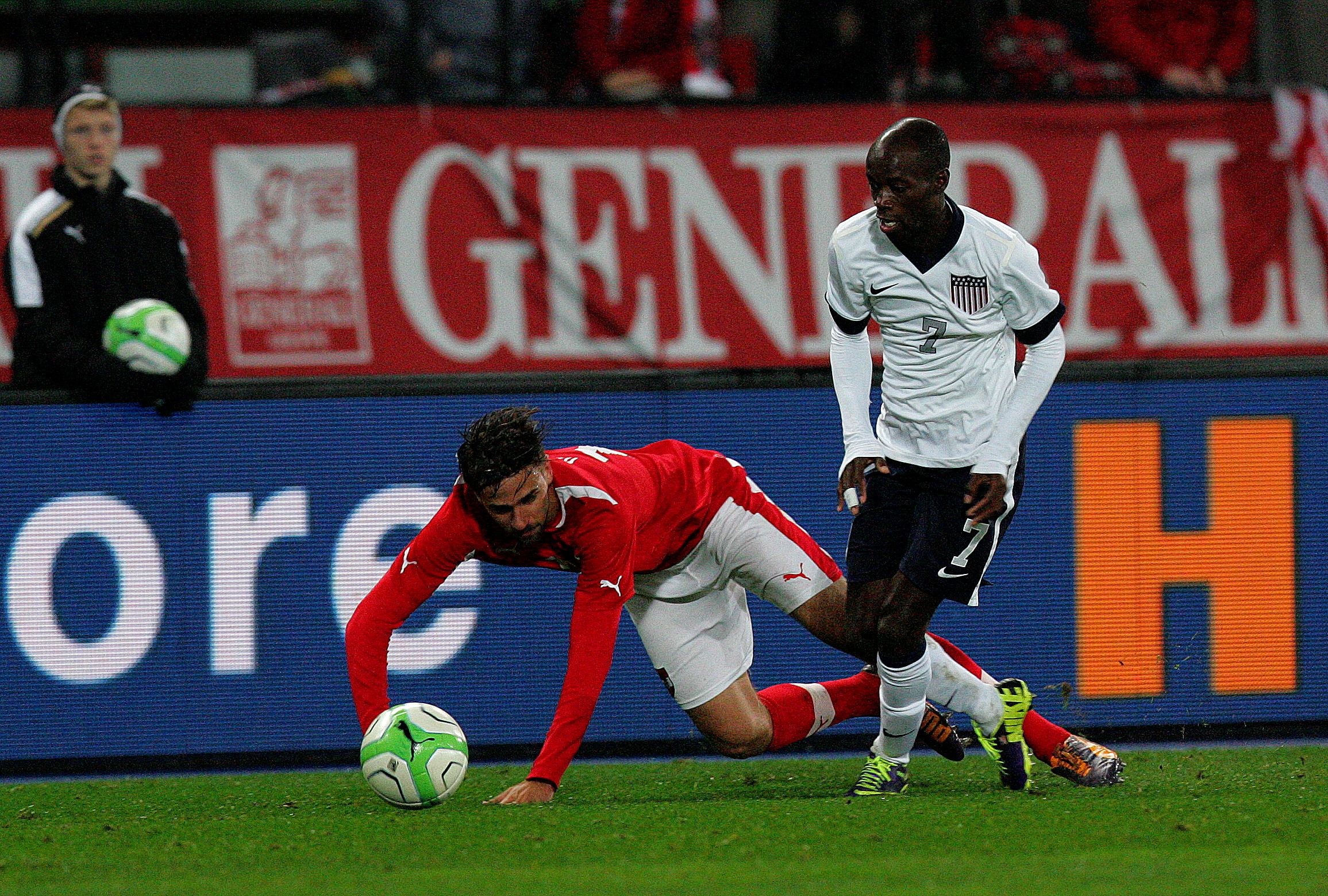 Freundschaftliches Länderspiel Österreich - USA 19.11.2013 in Wien: DaMarcus Beasley, Martin Harnik